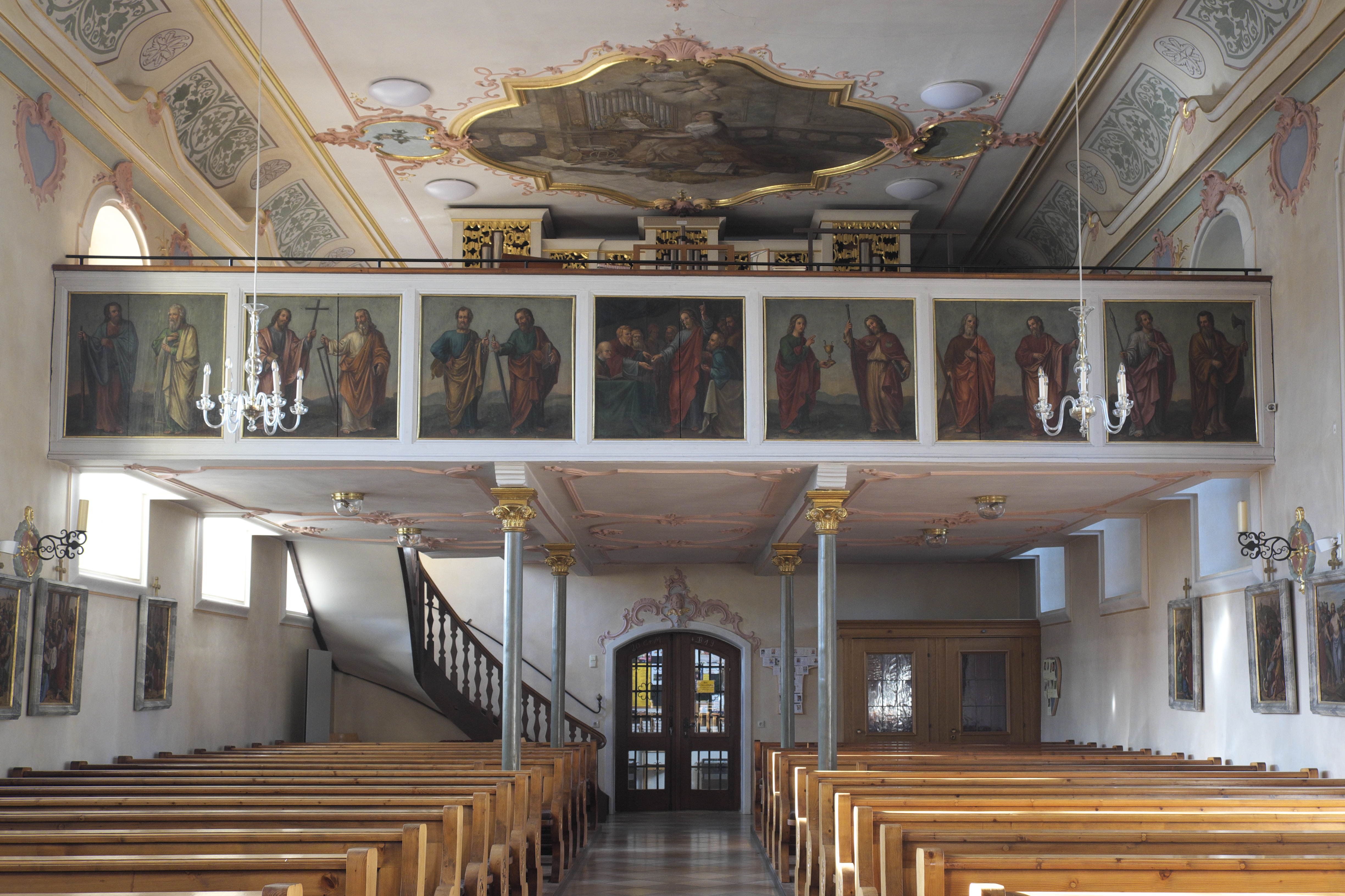 Katholische Pfarrkirche St. Laurentius in Petershausen im Landkreis Dachau (Bayern/Deutschland), Empore